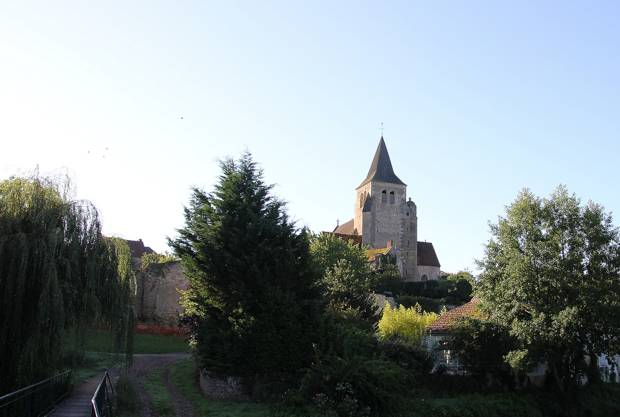 Eglise Saint Etienne d'Ainay le Château (03)